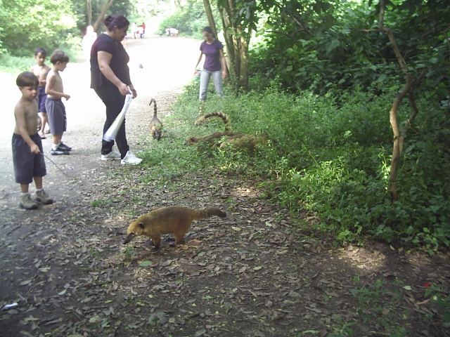 Quatis no Parque Ecológico do Tietê, na Zona Leste de São Paulo.